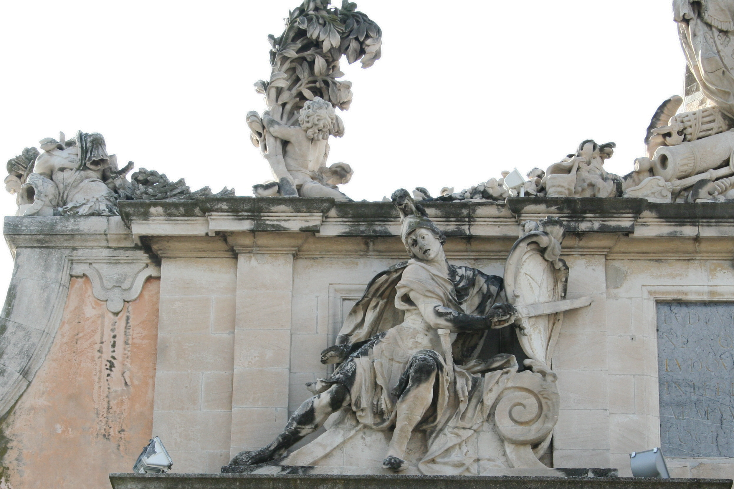 Ancienne porte de l'arsenal de Toulon, aujourd'hui musée de la Marine. Sculpture de Verdiguier représentant Mars, dieu de la guerre.